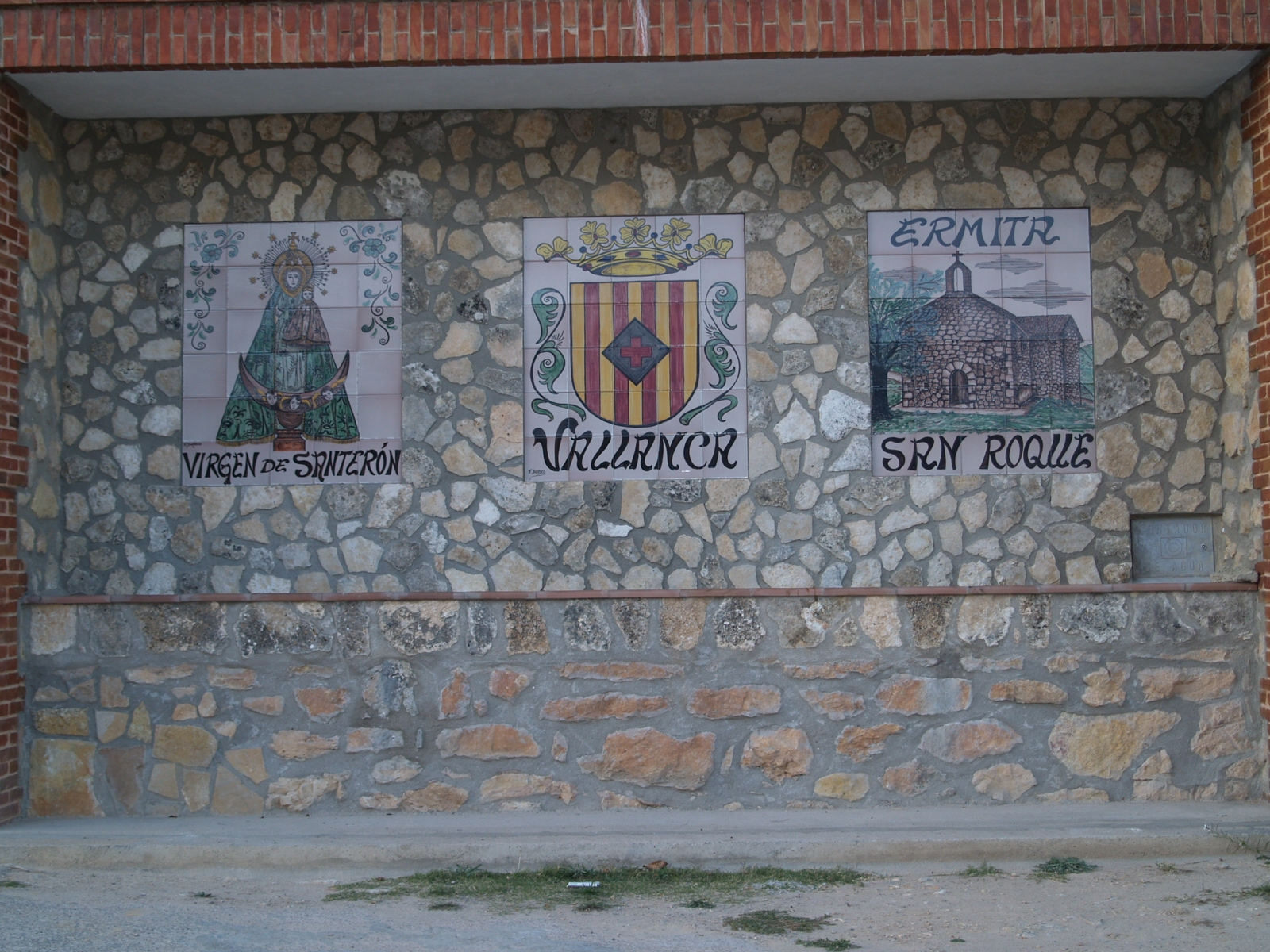 Fuente-abrevadero de las escuelas, en la entrada de Vallanca desde Ademuz